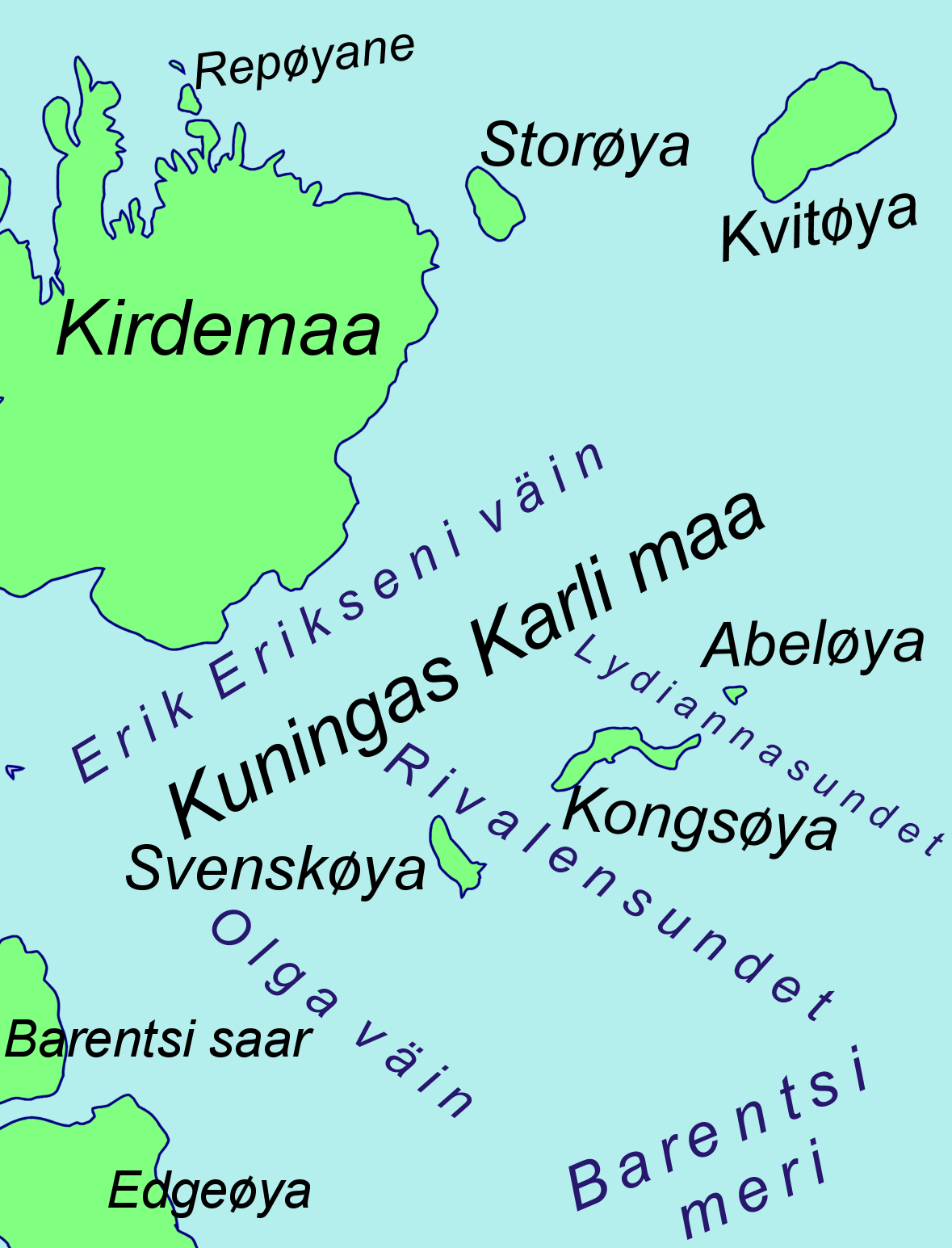 Kuningas Karli maa saarte kaart